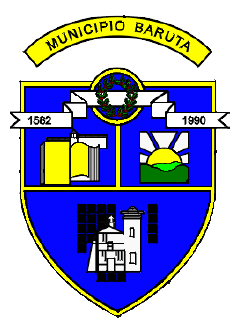 Escudo del Municipio Baruta. Estado Miranda. Venezuela